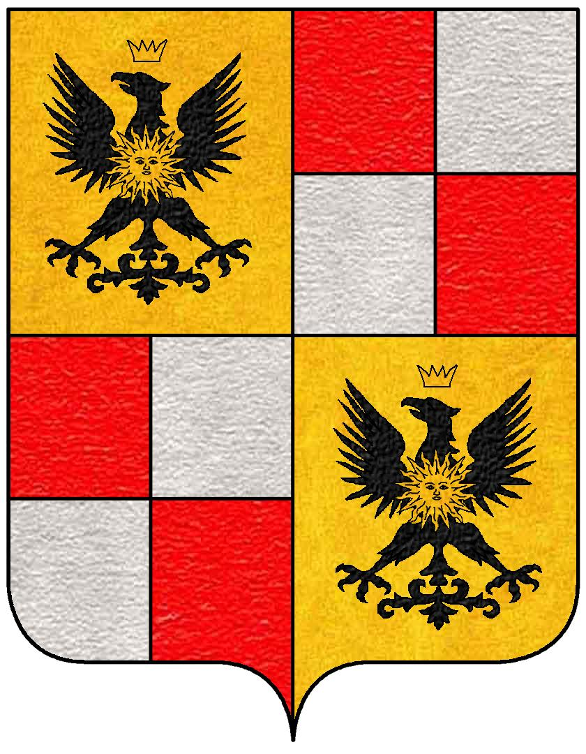 Stemma della famiglia Sagramoso